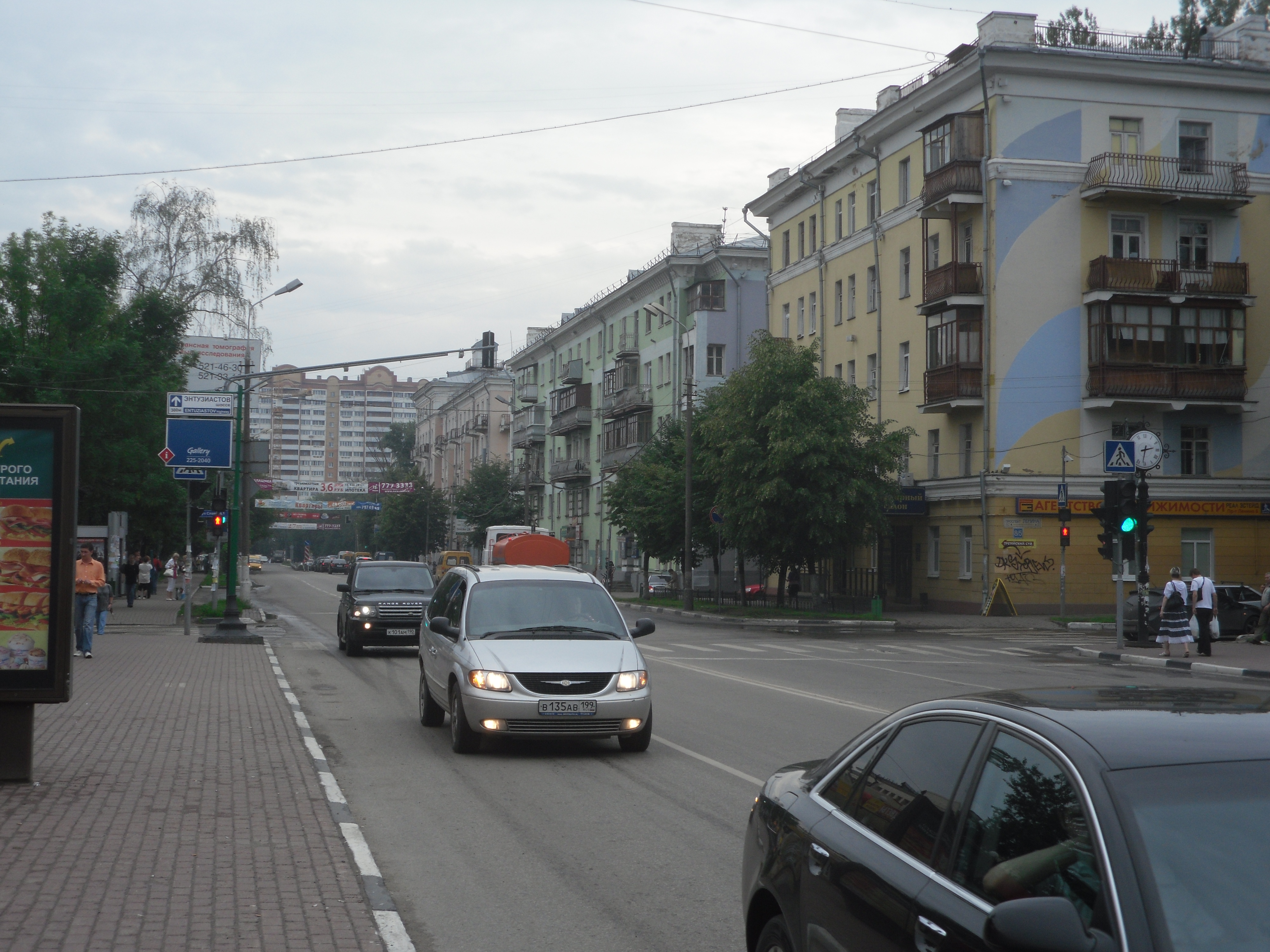 Вид на Советскую улицу в Балашихе со стороны проспекта Ленина